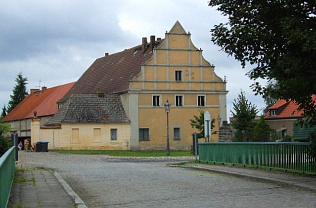 Altes Gutshaus, Schloss Reckahn